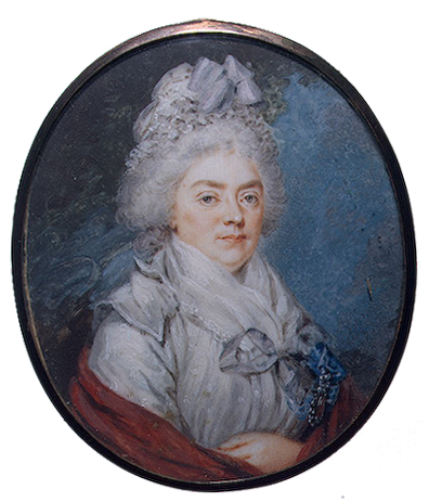 1739-1802; née Chernysheva